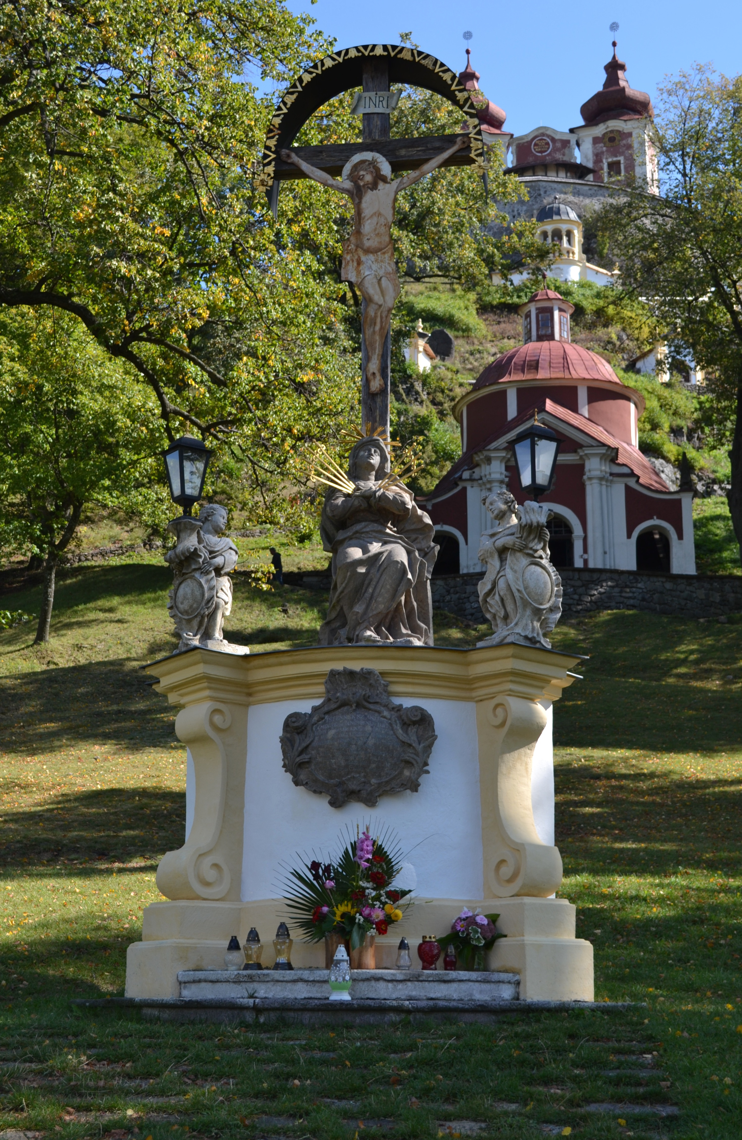 Banskoštiavnická kalvária, súsošie - Panna Mária Sedembolestná a Kristus - Panna Mária pod krížom, Kristus a anjeli